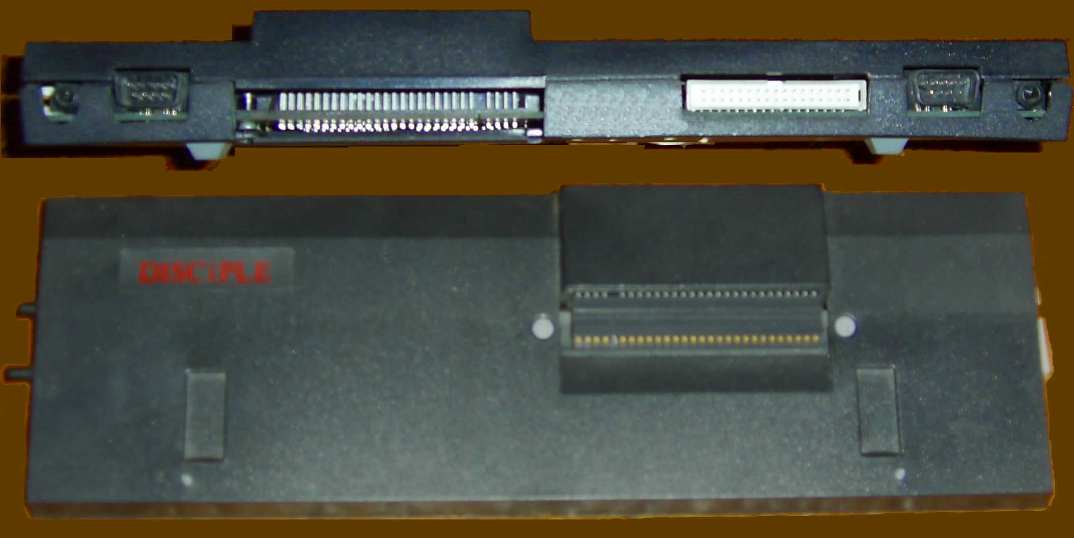 Interface DISCiPLE vista trasera y superior. Fotos tomadas de mi interface y montadas por mí mismo.